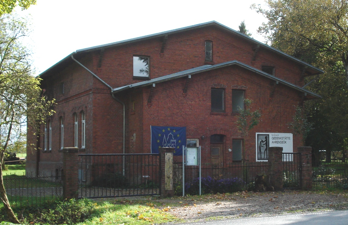 Die Gedenkstaette / Gebäude des KZ Ahrensboek